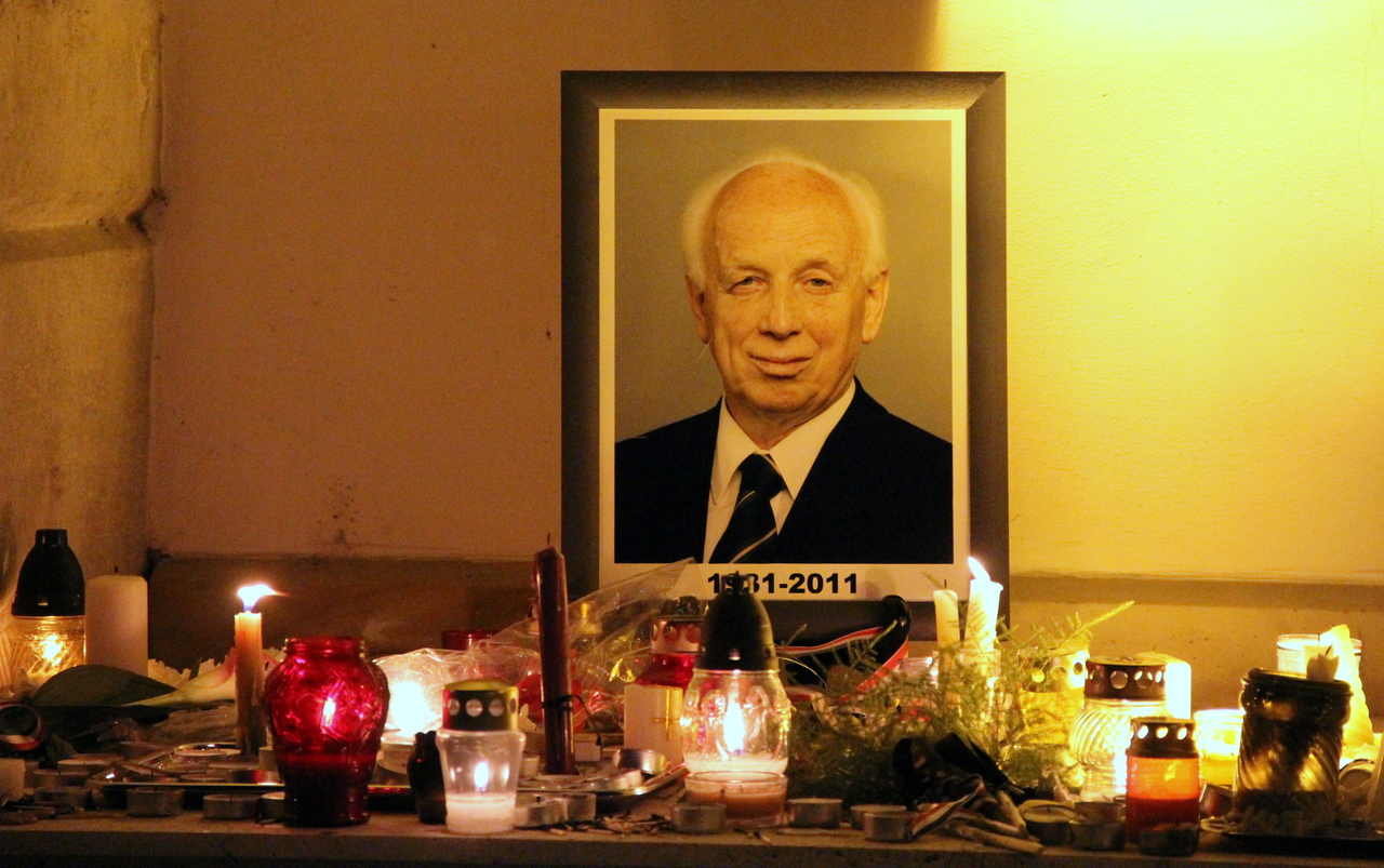 Búcsú a miniszterelnöki palotánál, 2011. 05. 30.